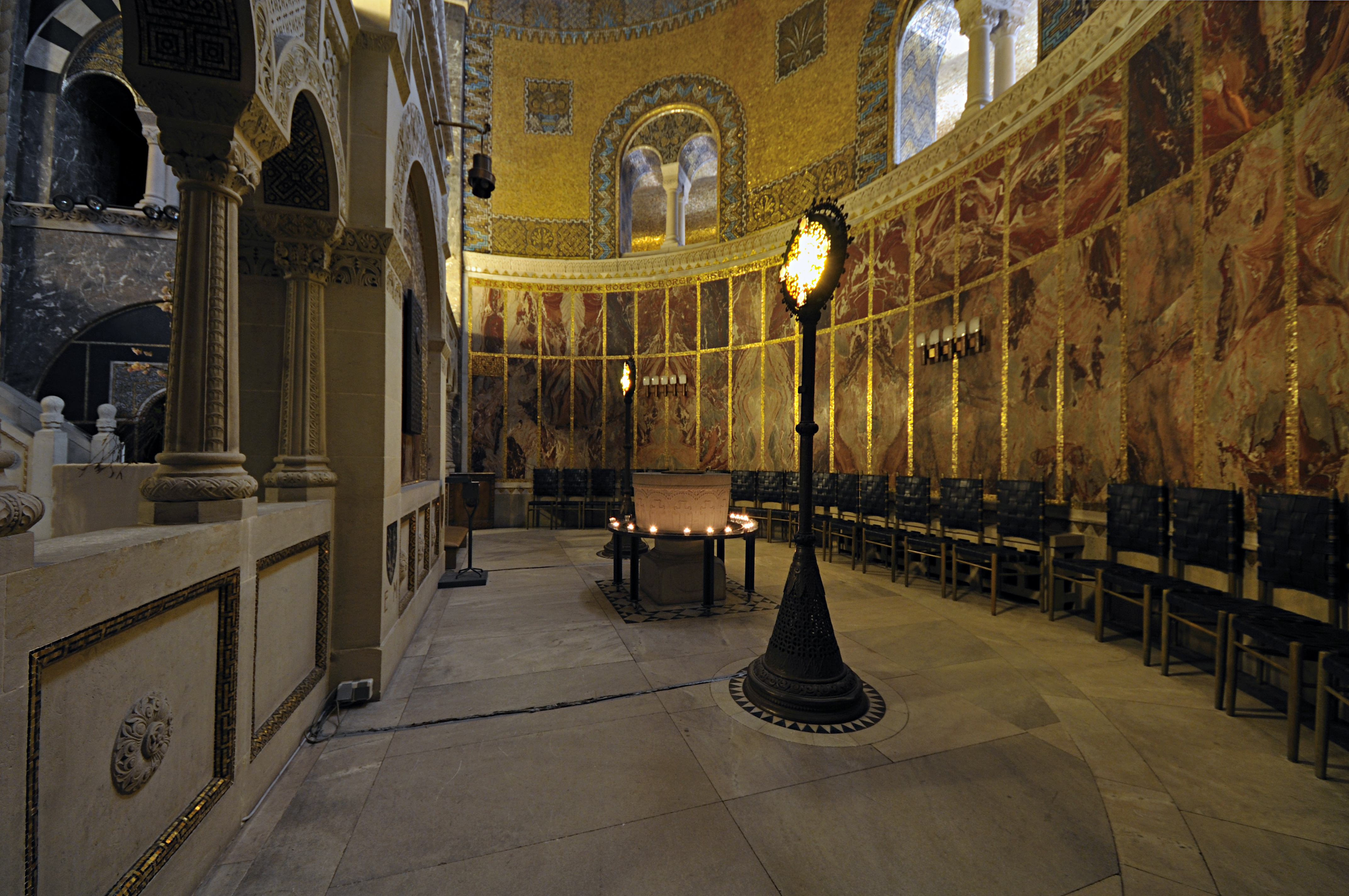 Erlöserkirche Bad Homburg: Blick in die Apsis